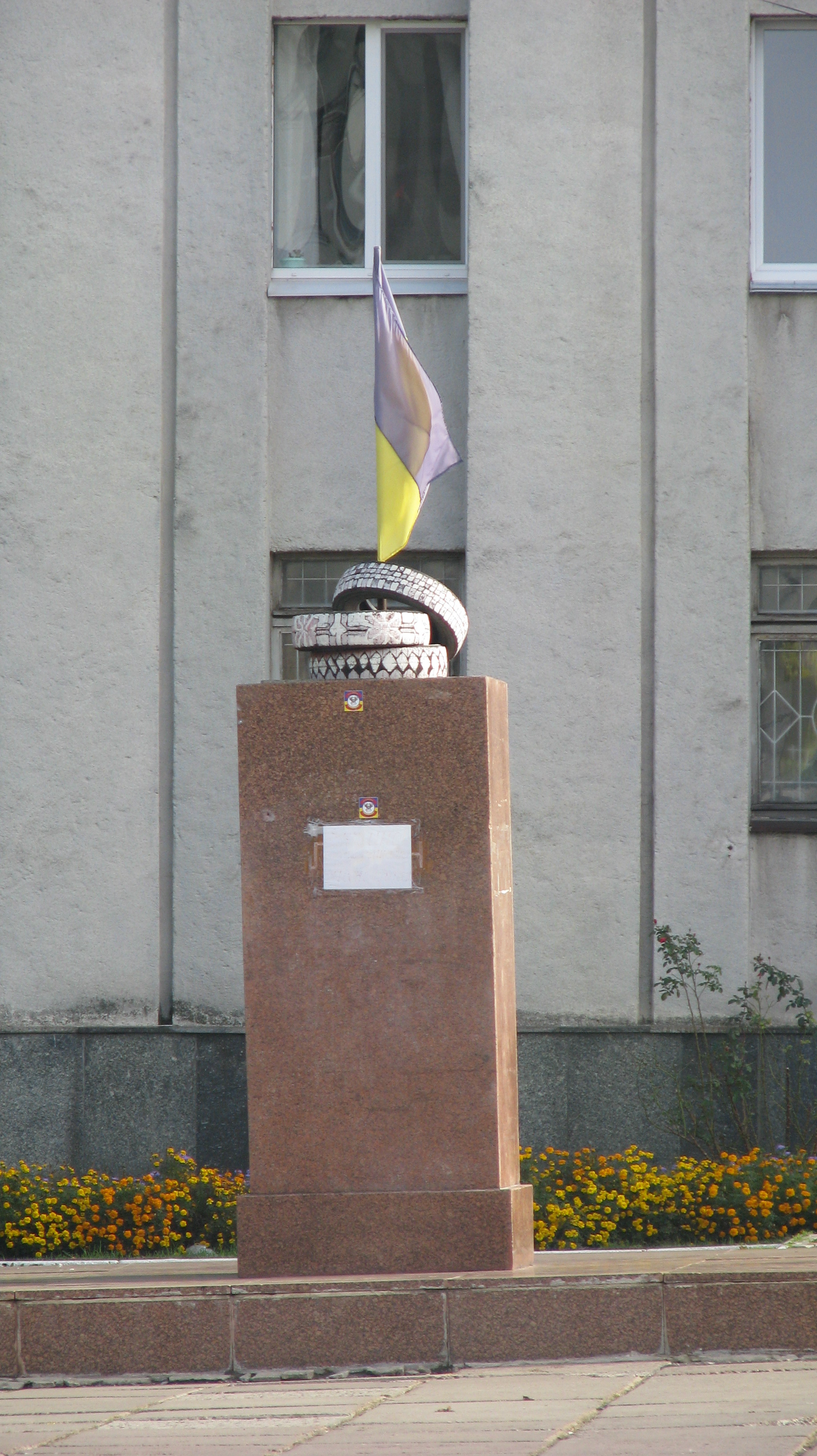 снесенный памятник Ленину возле горсовета